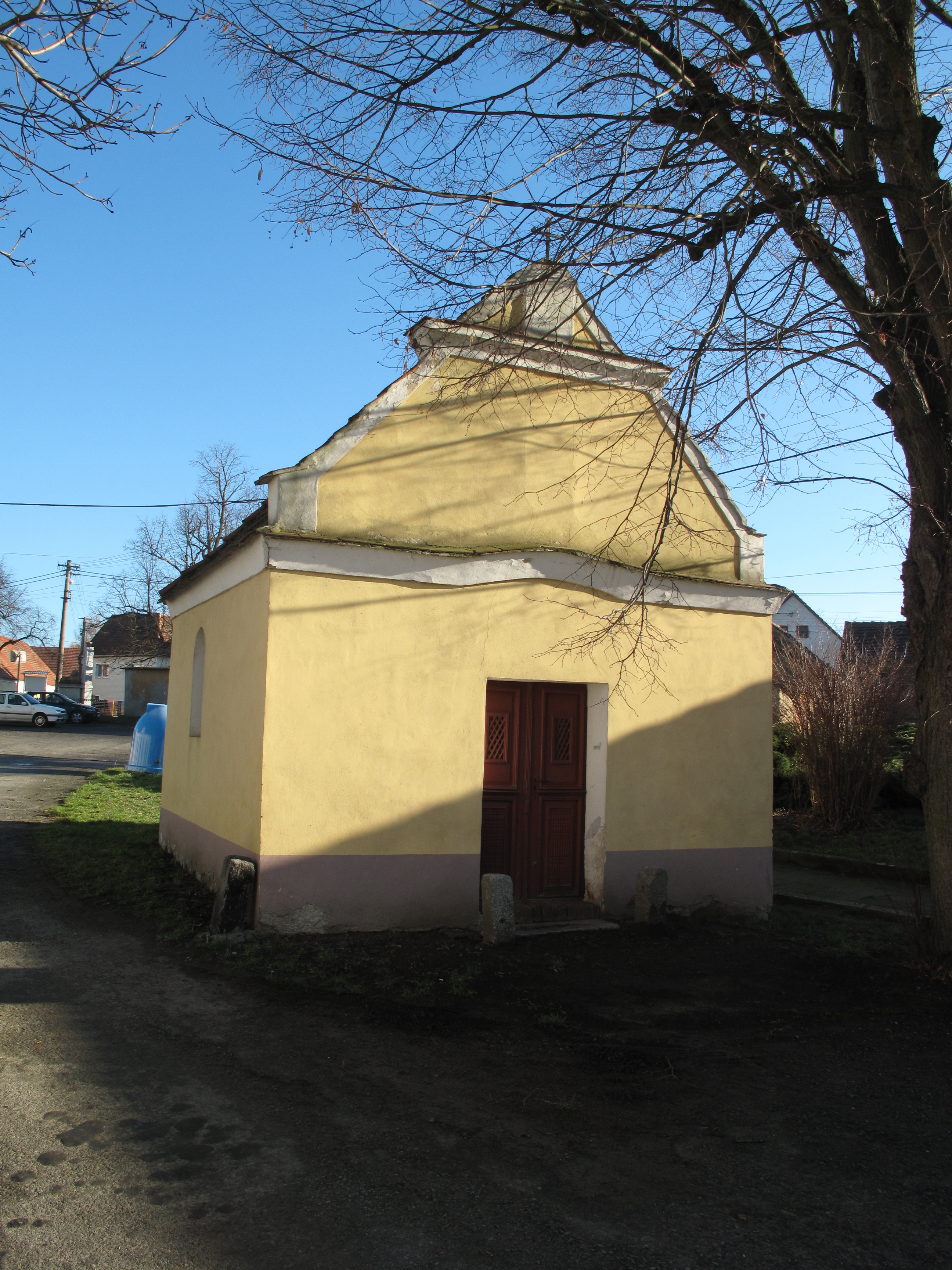 Kaplička v Zeměticích. Okres Plzeň-jih, Česká republika.